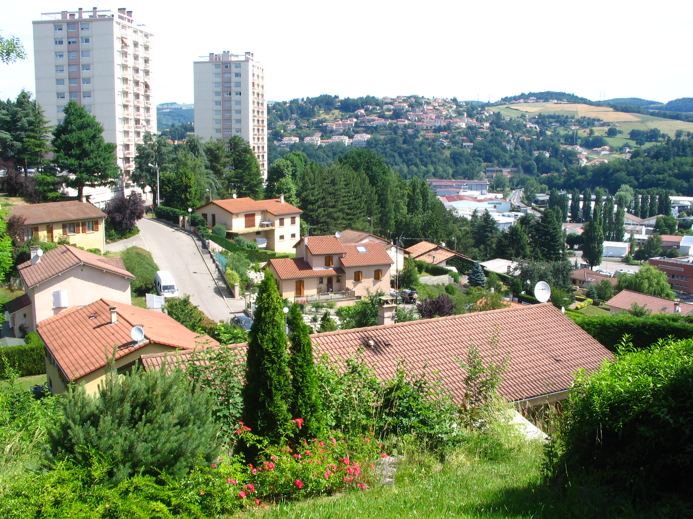 St-Priest en Jarez (Loire) -- descente vers la route de l'Etrat au 1er plan, ZA de la Bargette/Moulin Picon à droite; La Tour au fond, en hauteur.